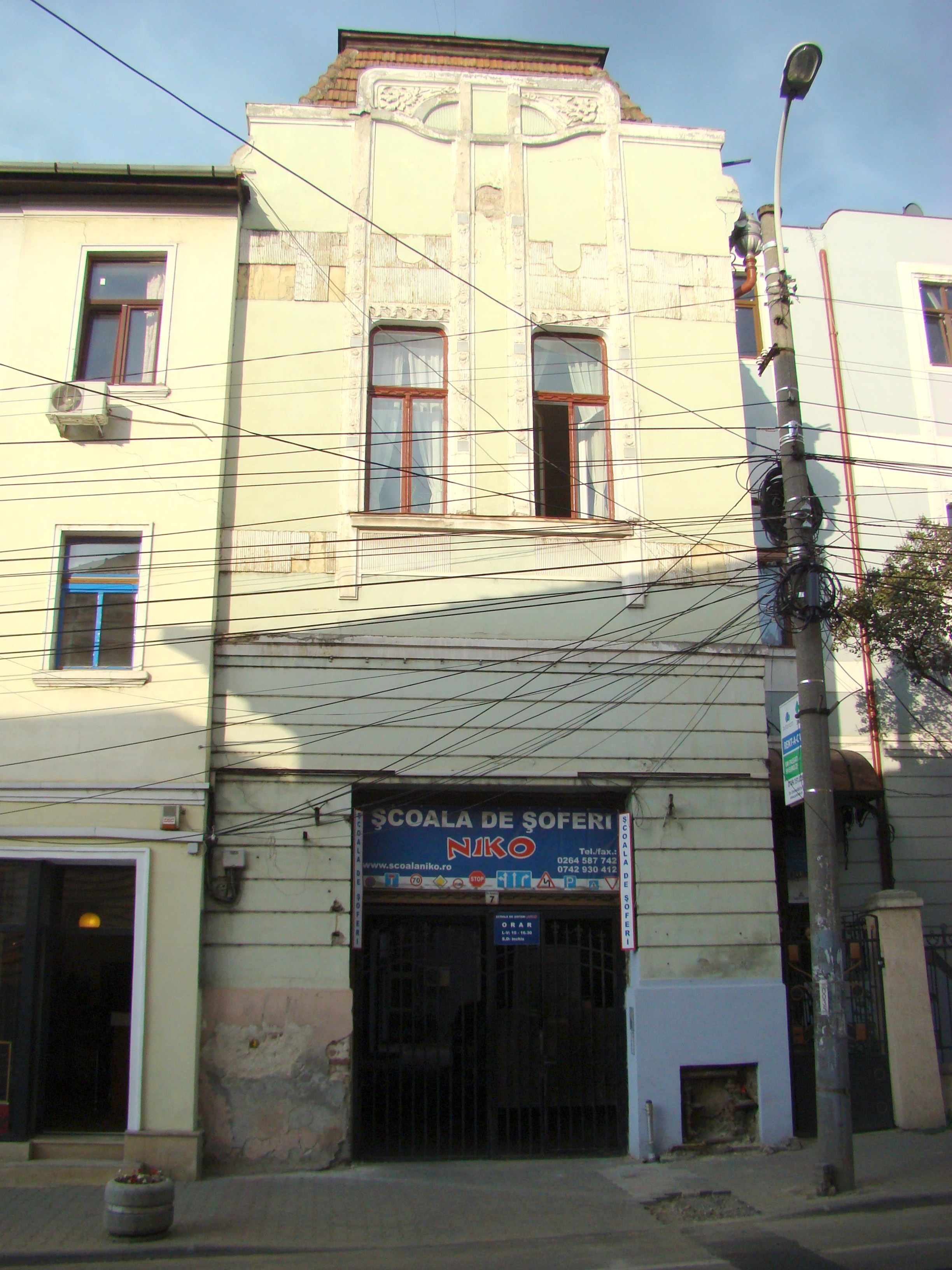 Clădire monument istoric, str.Republicii, nr. 7